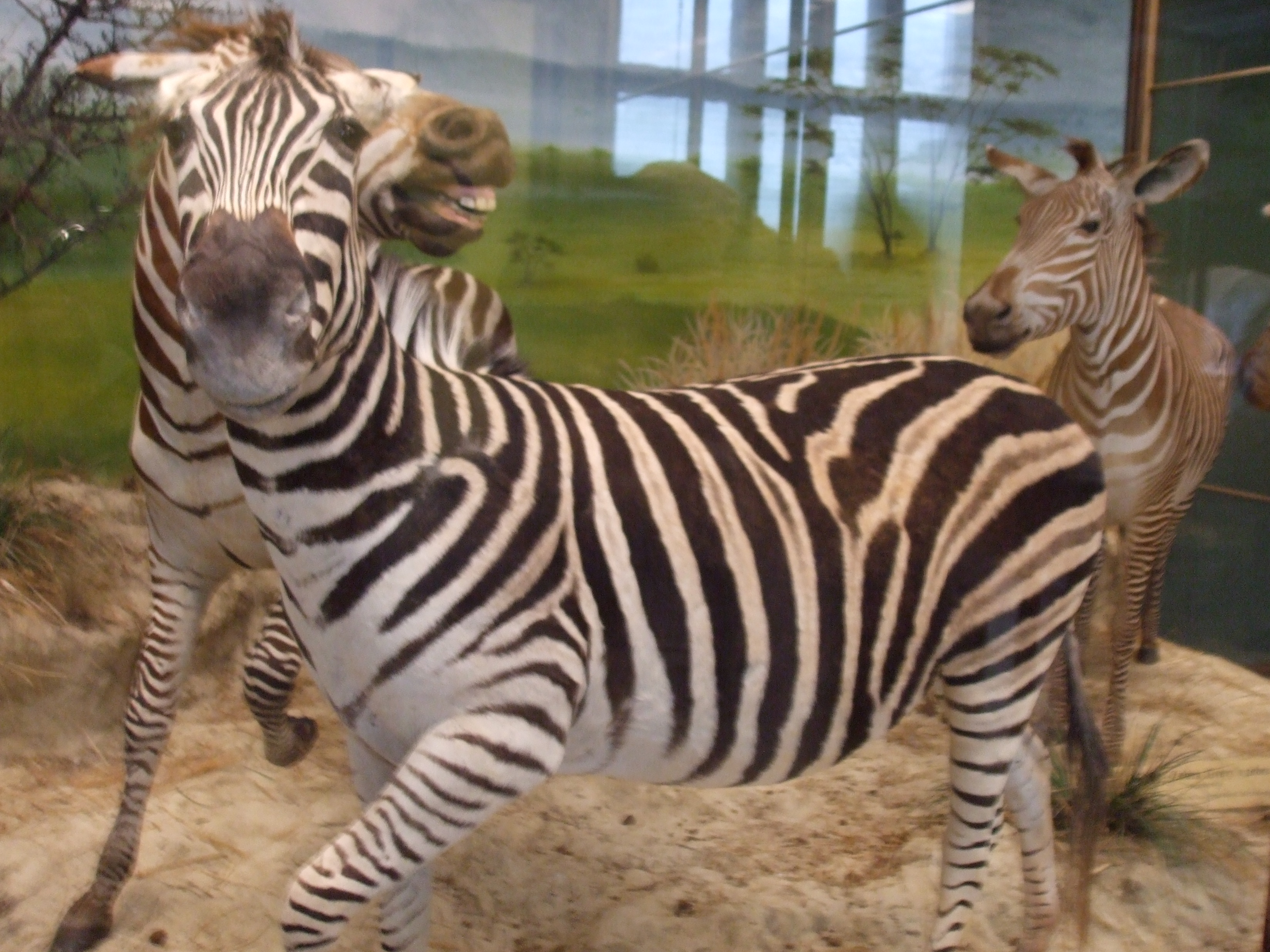 Zebra in Vienna